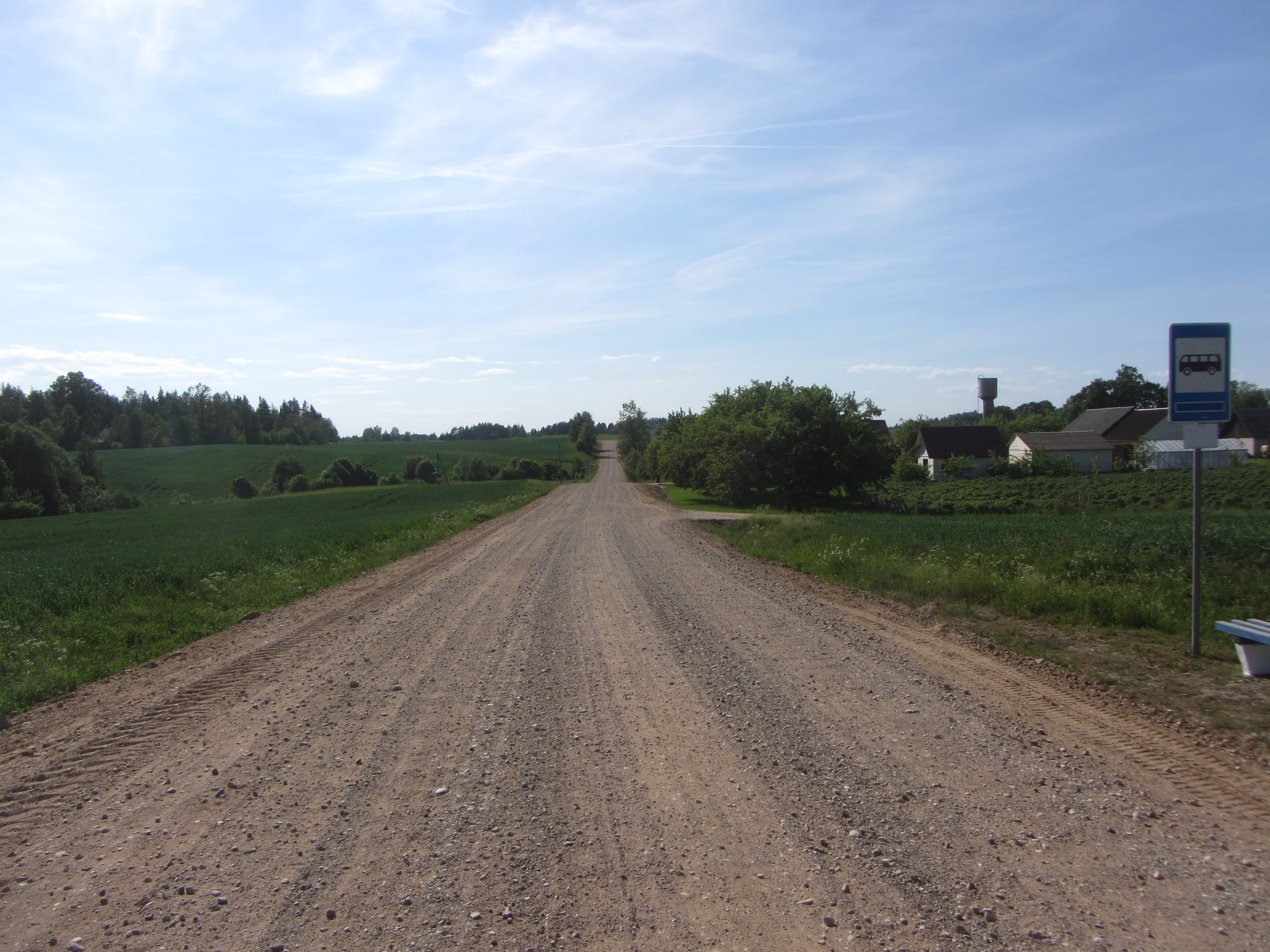 Jiezno sen., Lithuania